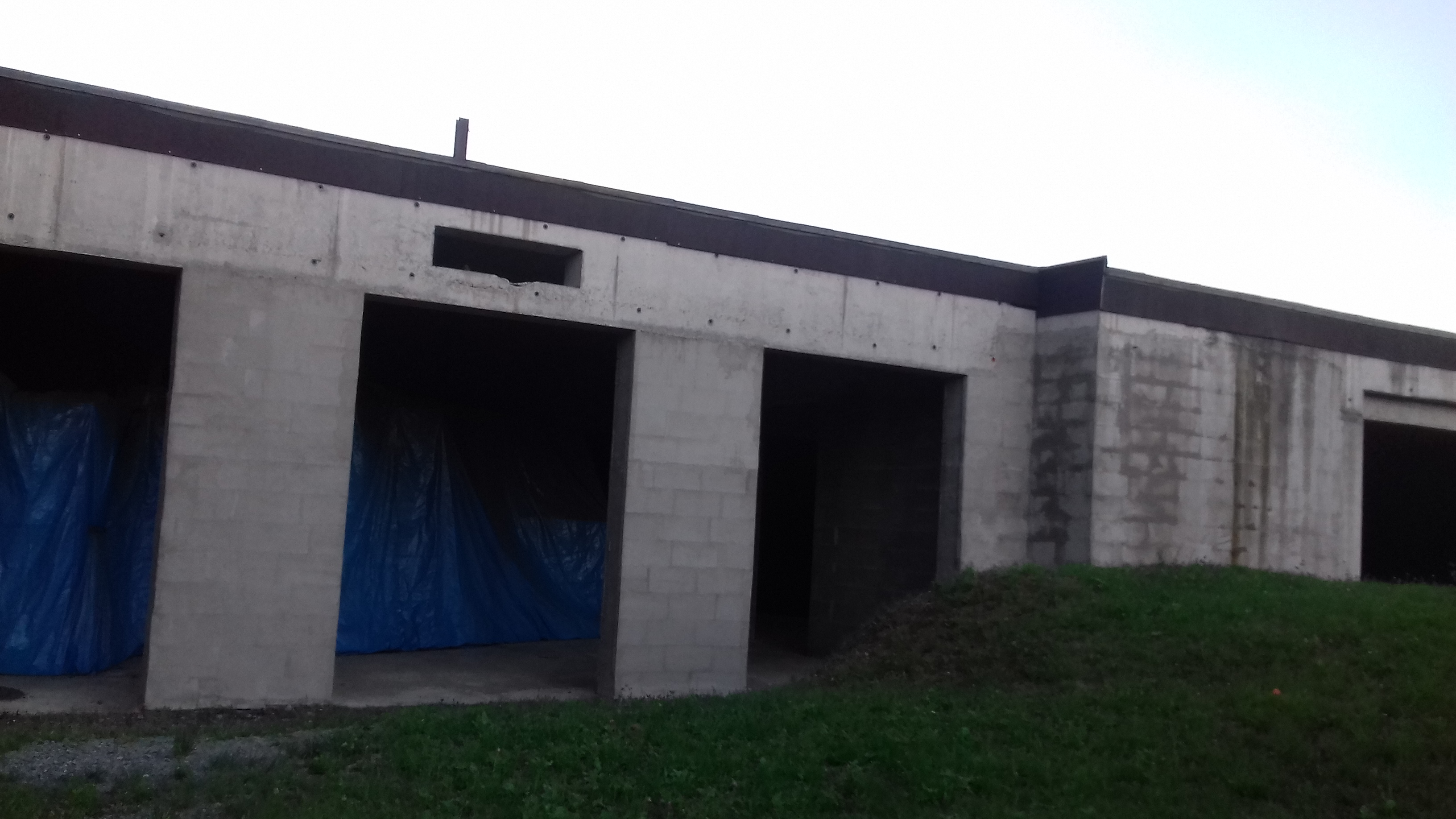 Rozestavěný Komunitní dům u hospice v Čerčanech